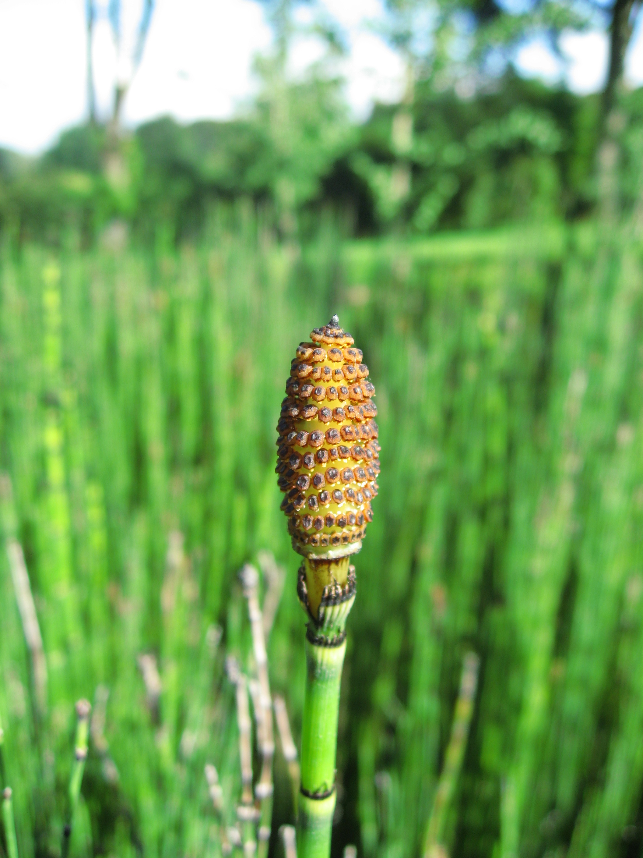 Equisetum hymale (prêle), photographié durant l'été 2006 en France (Picardie - Les Jardins de Valloire)